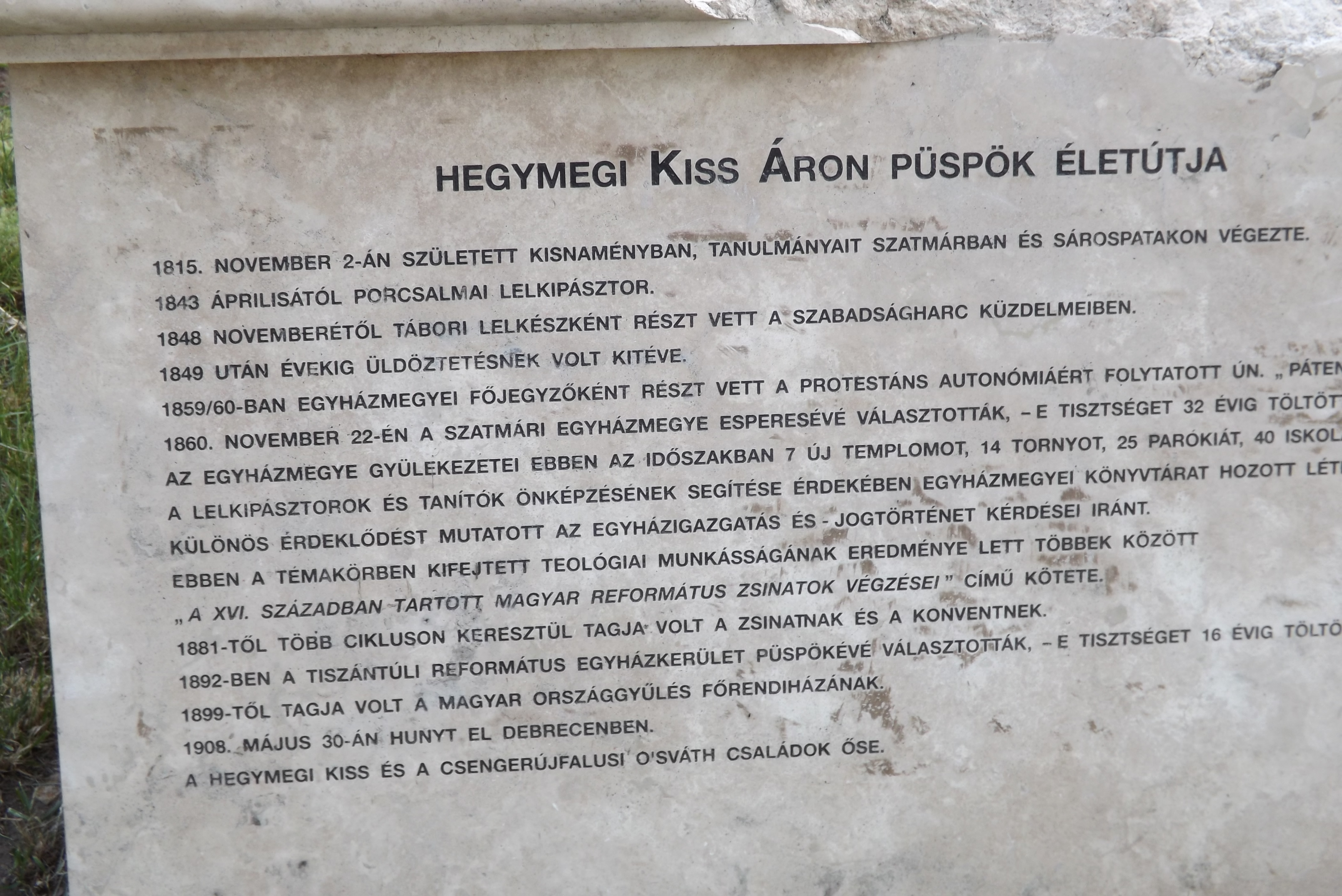 Hegymegi Kiss Áron püspök emlékezete, Debrecen